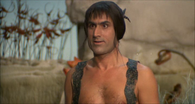 Screenshot del film Quando le donne persero la coda (1970) di Pasquale Festa Campanile, con Lando Buzzanca. Licensing 1970